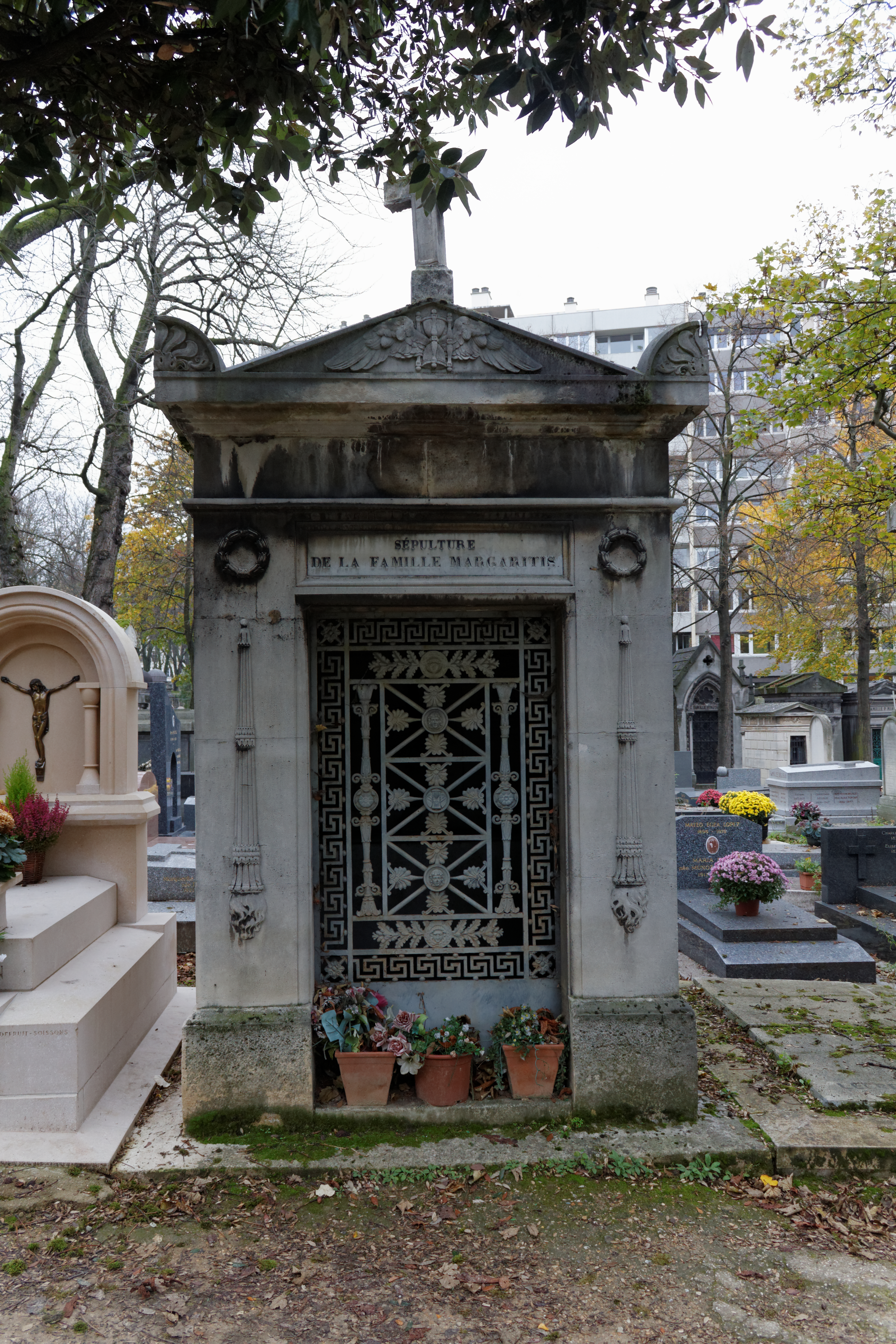 Chapelle